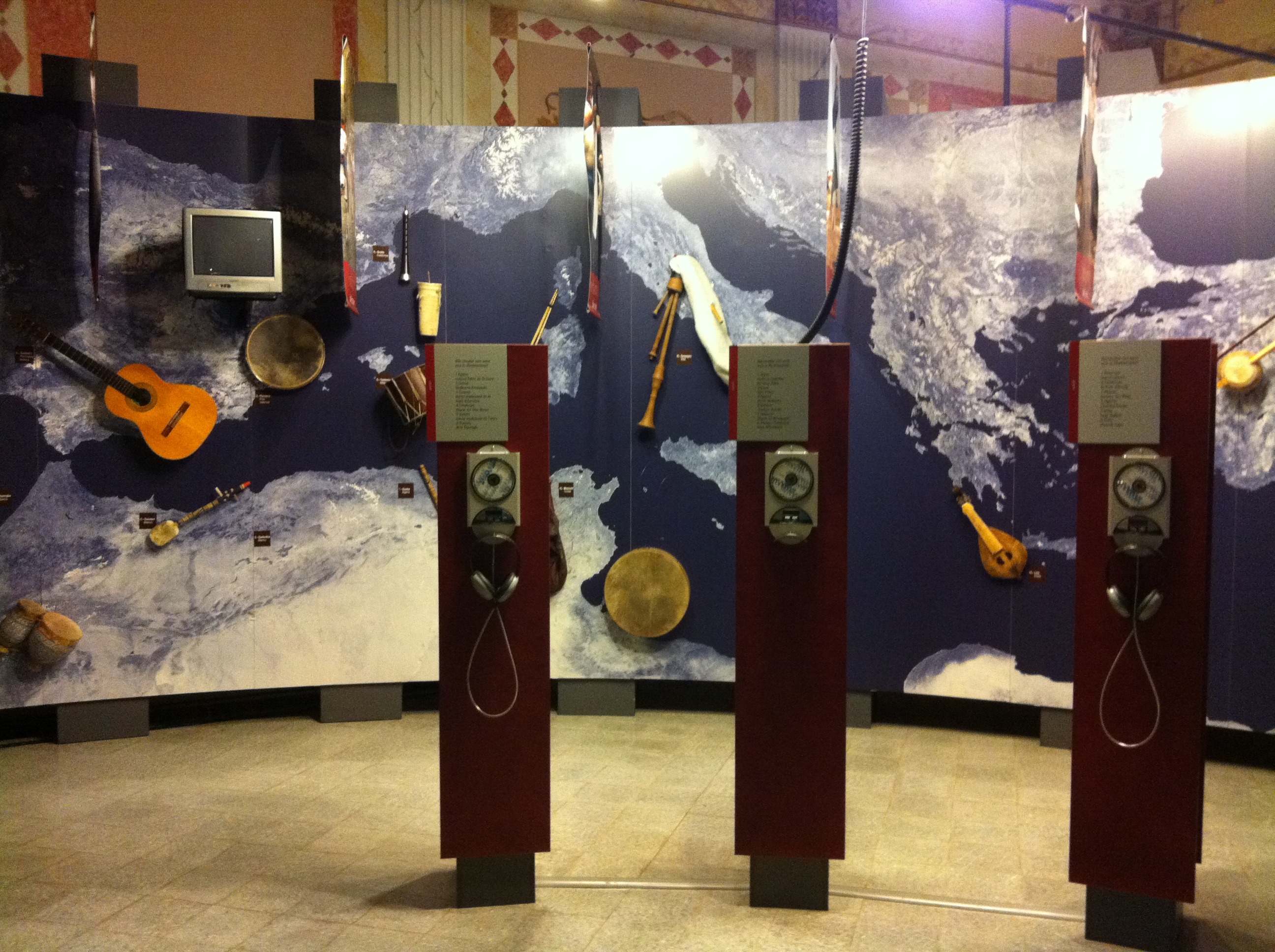 Museu de la Mediterrània de Torroella de Montgrí